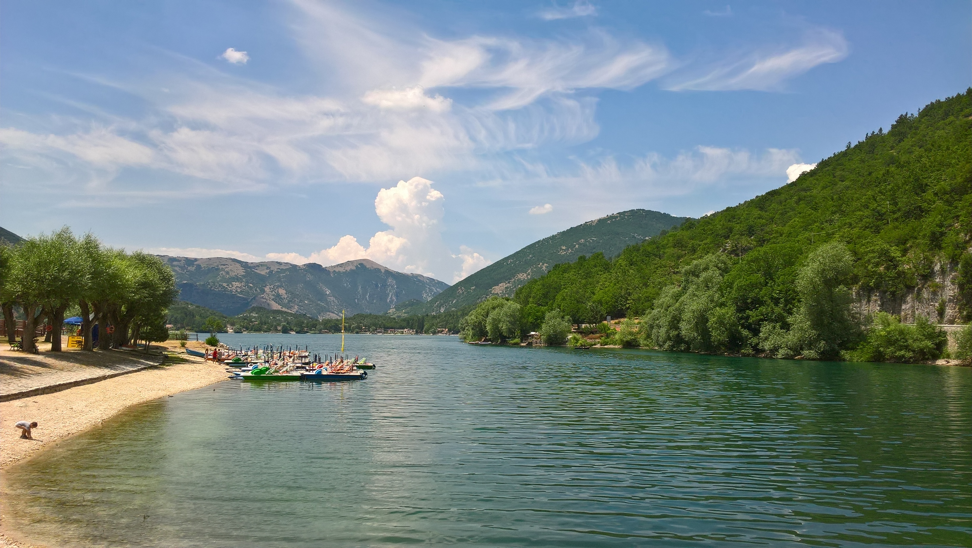 Lago di Scanno